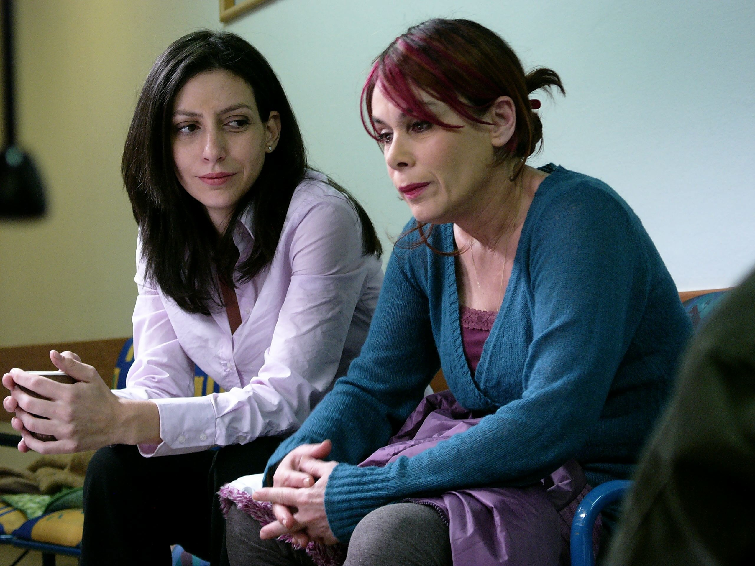 בין השמשות. צילום קארין בר